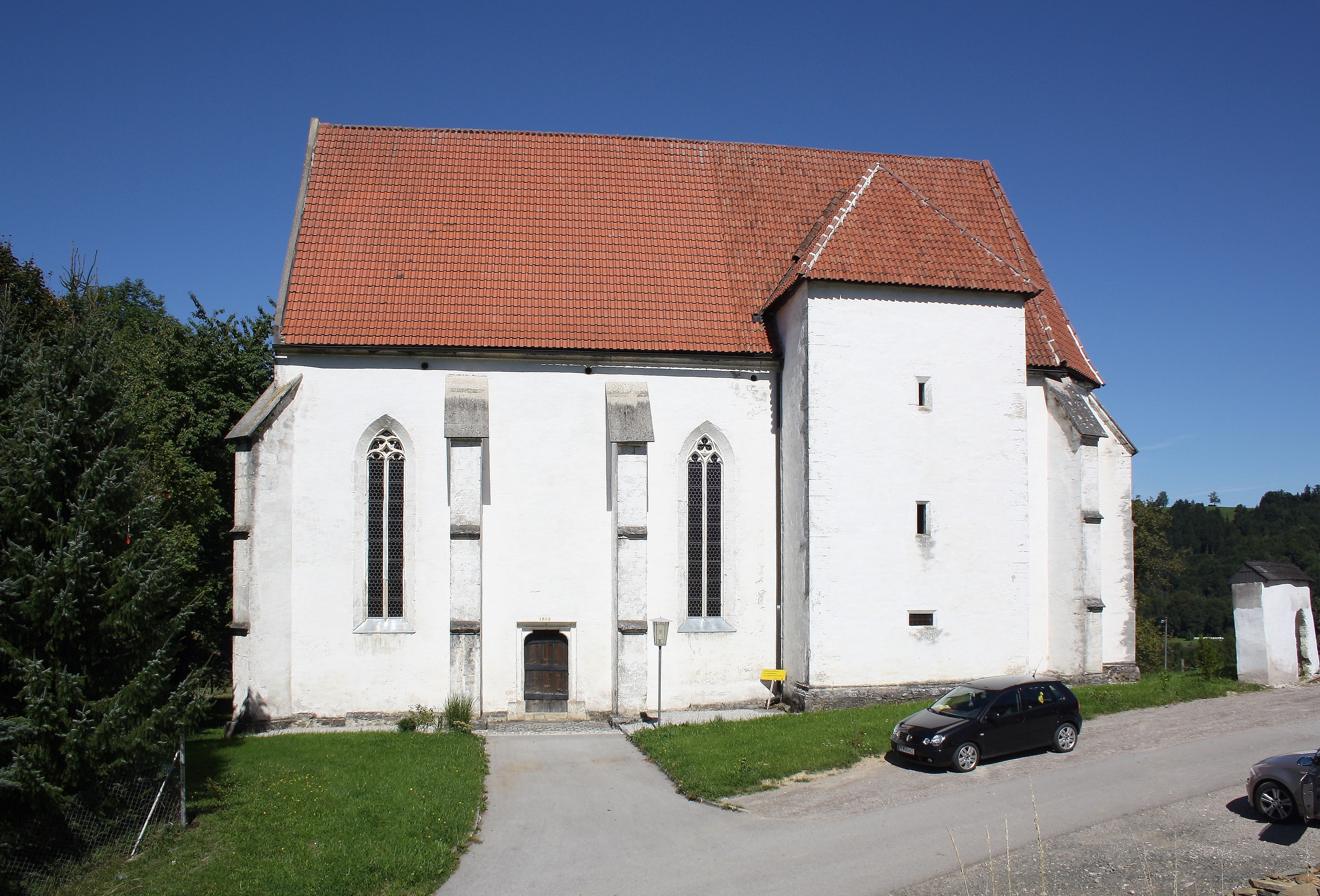 Die Filialkirche "Hl. Andreas" in der niederösterreichischen Ortschaft Tradigistdorf, Marktgemeinde Kirchberg an der Pielach